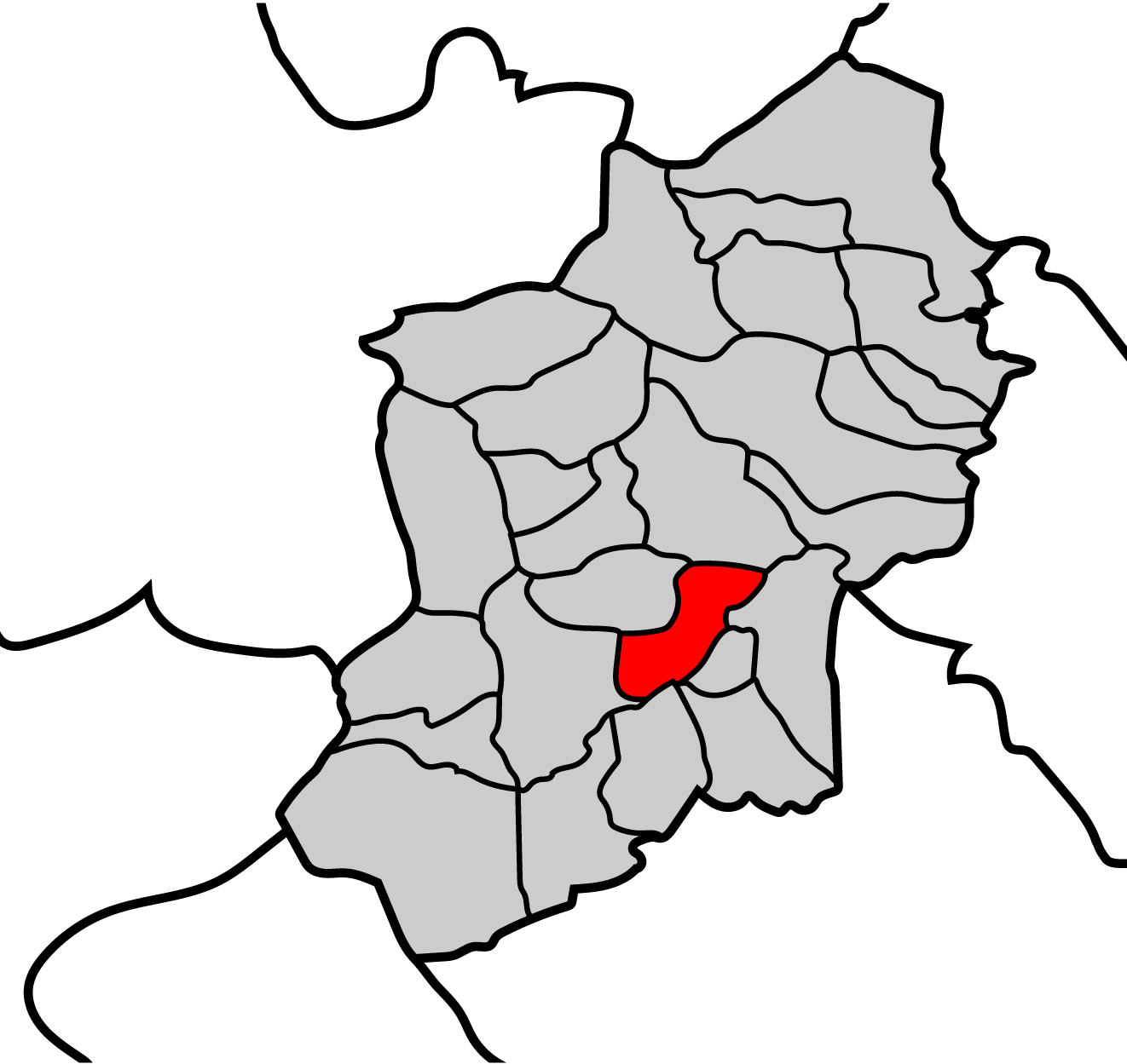 Mapa de la parroquia de Cruzul Ayuntamiento de Becerreá